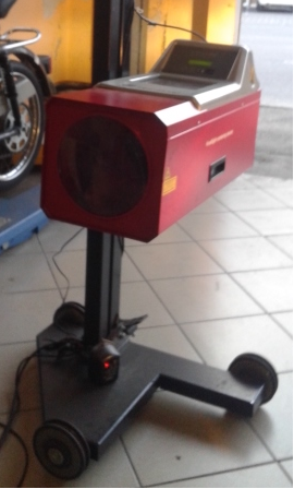 apparecchiatura per la regolazione del fascio luminoso dei veicoli